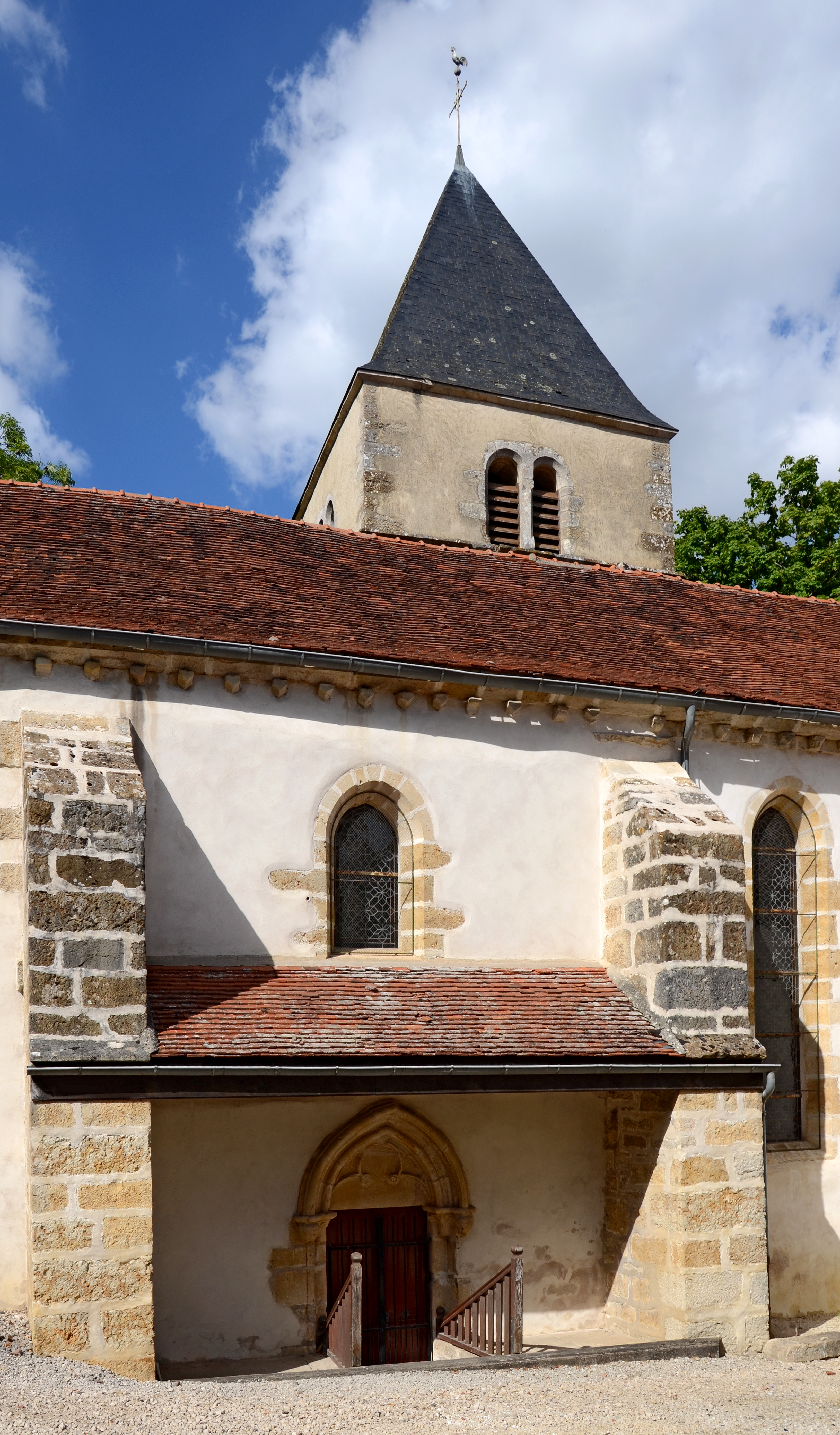 Eglise de Grignon, Côte d'Or, France .